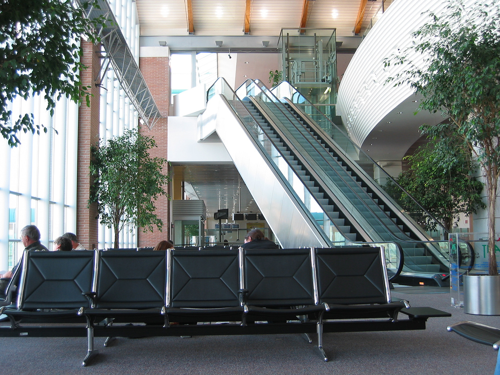 Marco Polo, Venezia, Italia